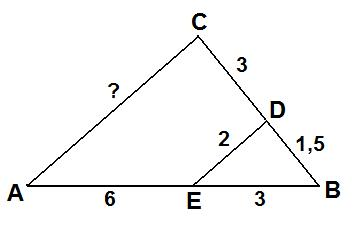 Forholdet mellem BD og BC er 3, fordi BC er 3 gange længere end BD. Ligeledes er BA 3 gange længere end BE. Multiplikationsfaktoren mellem trekant BED og trekant ABC er altså 3. Man kan således regne ud at AC må være 3 gange længere end DE, dvs. 6.